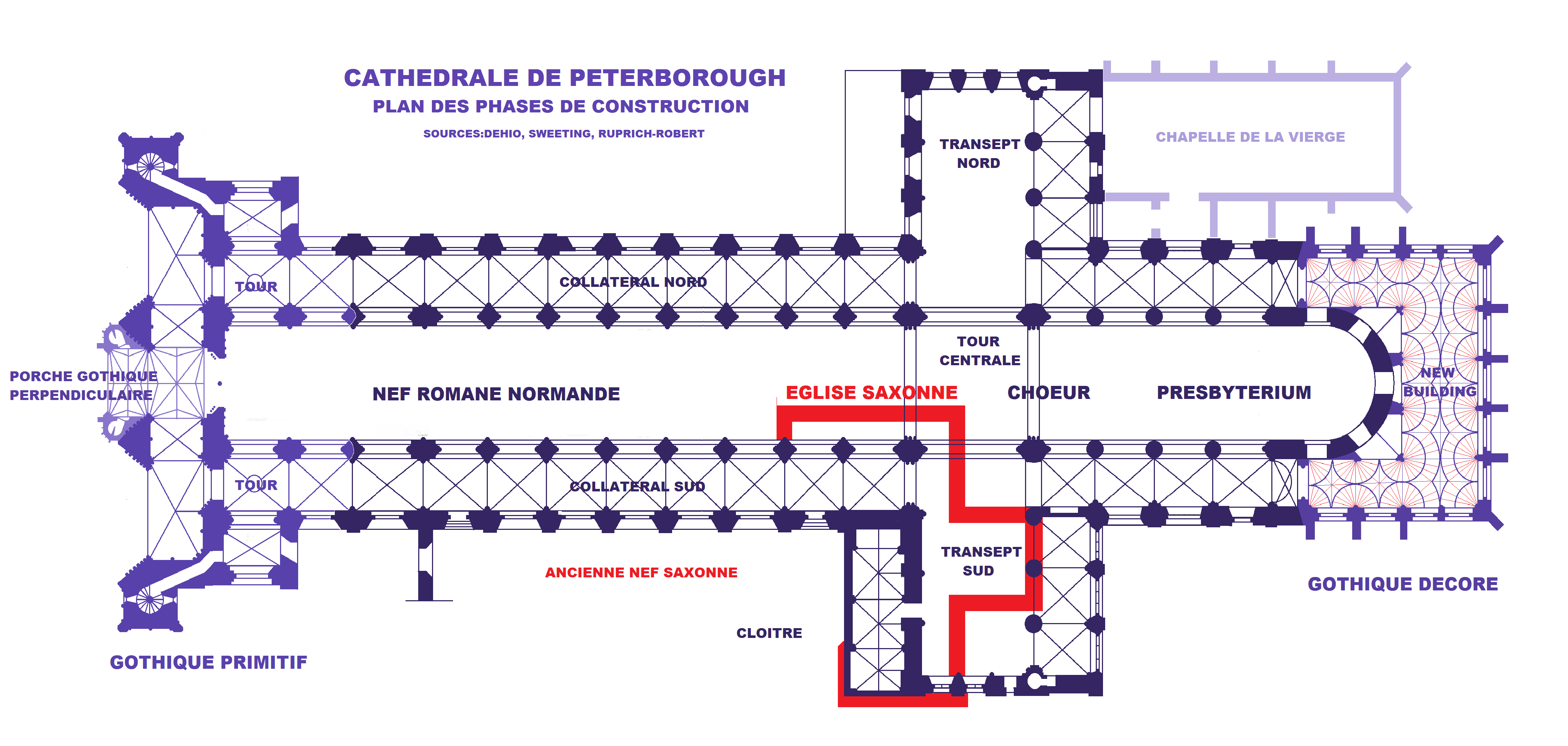 Cathédrale de Peterborougn, Plan des phases de construction